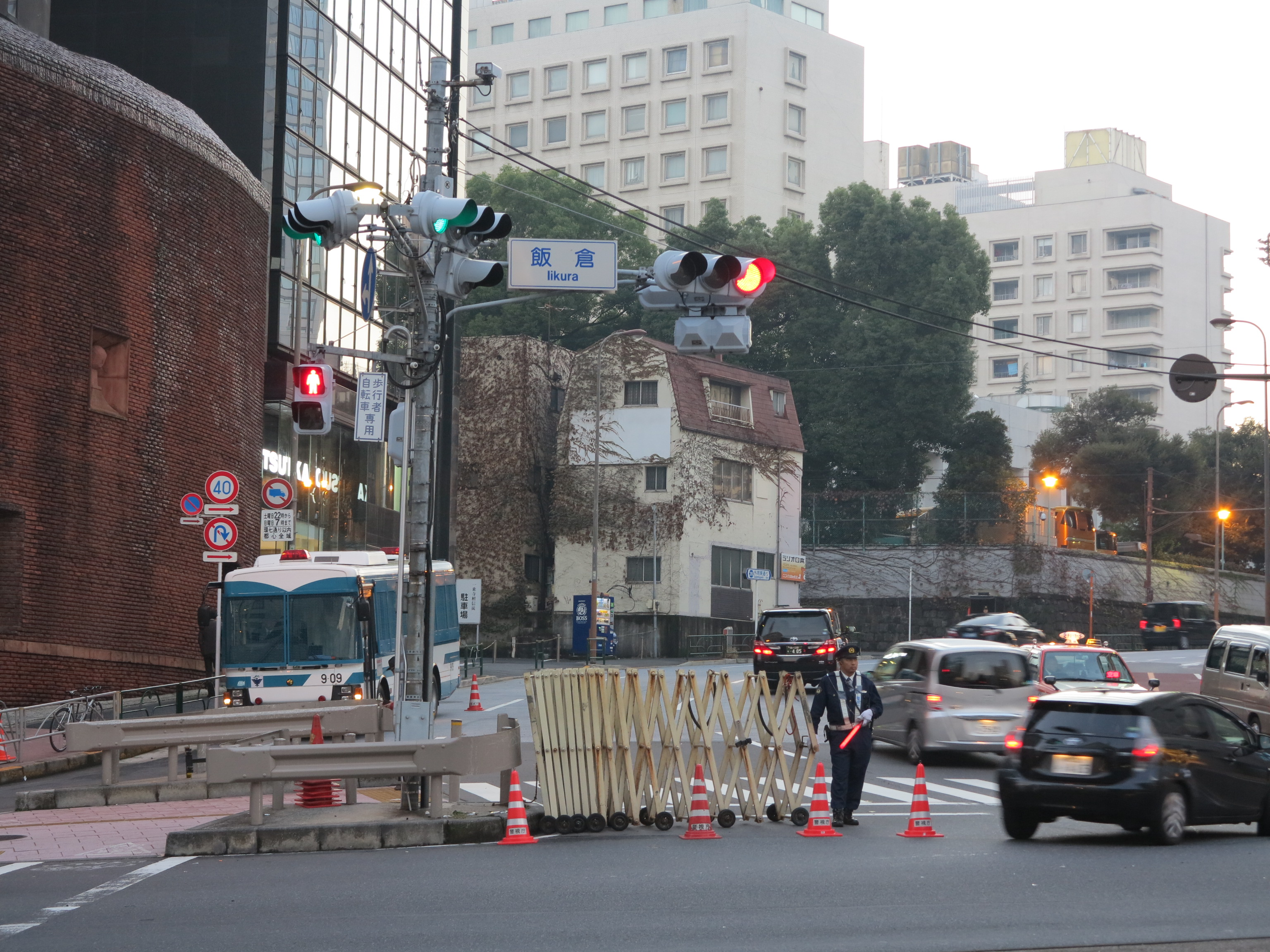 港区麻布台の飯倉交差点